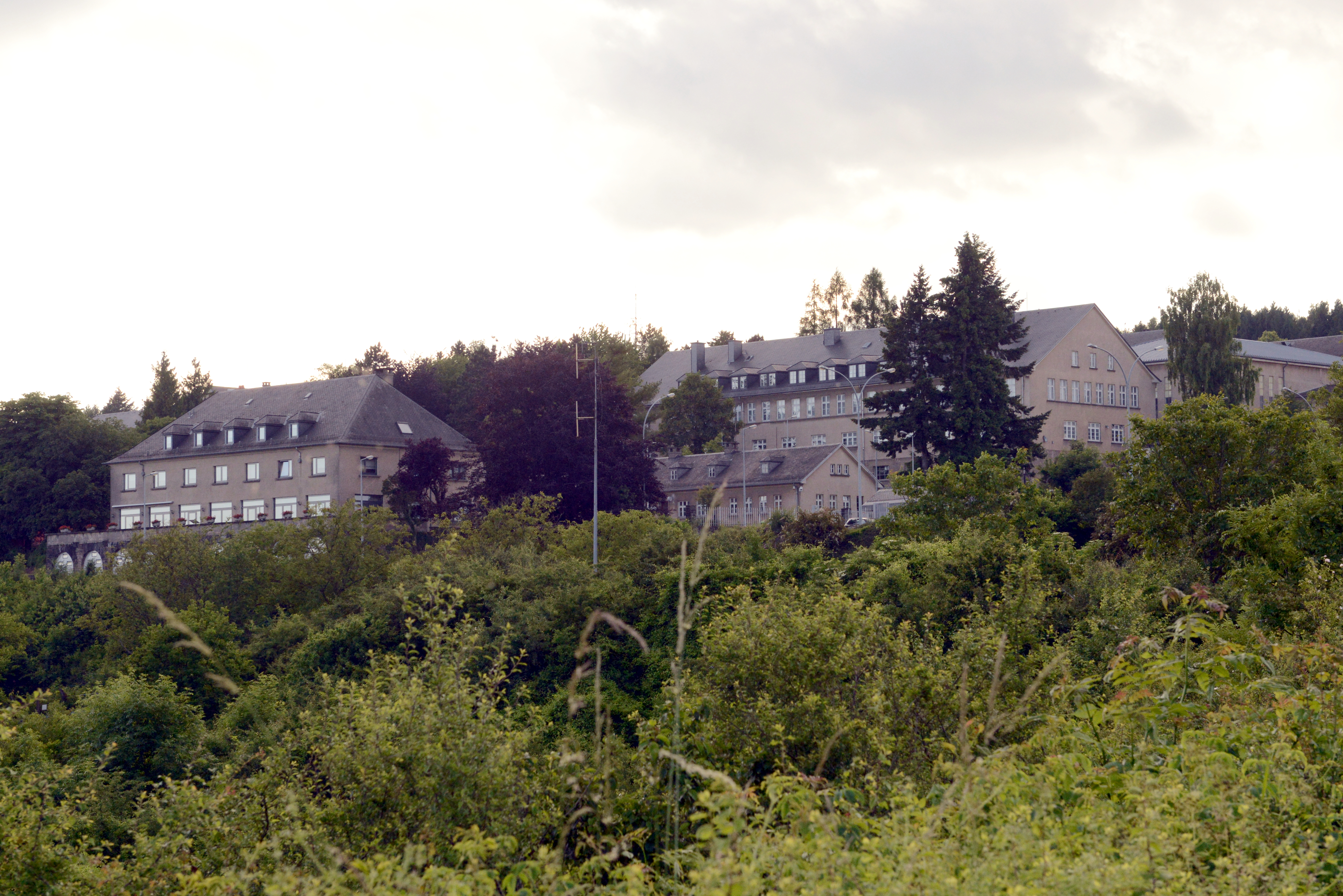 D'Kasär Grand-Duc Jean um Härebierg zu Dikrech.